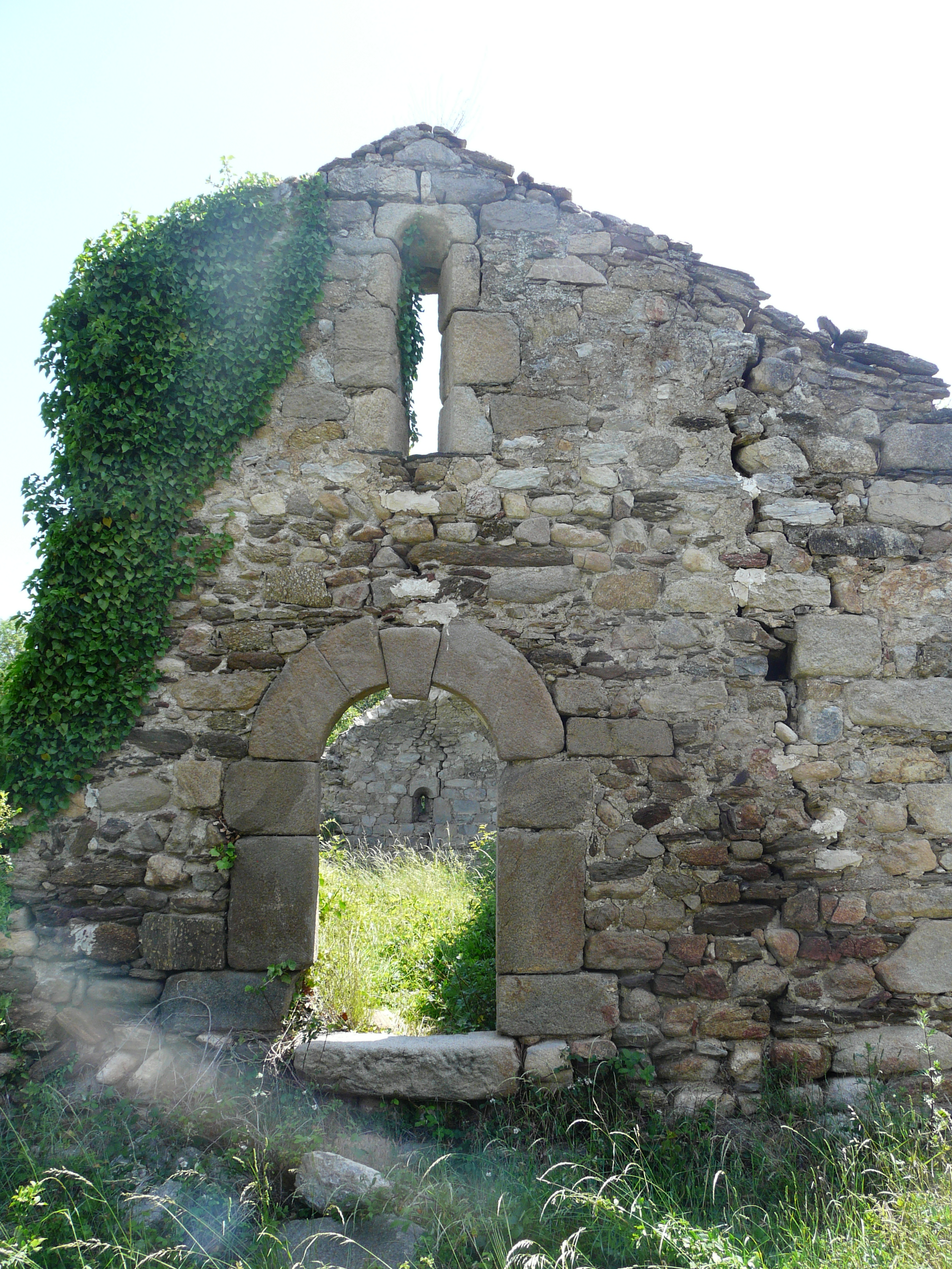 Porta oest de Sant Pere de Fillols